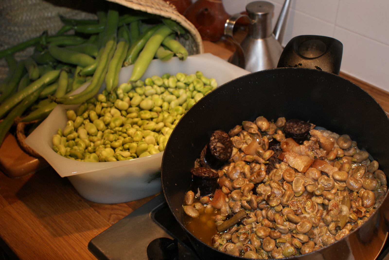 "Faves amb butifarra negre".Any 2010.